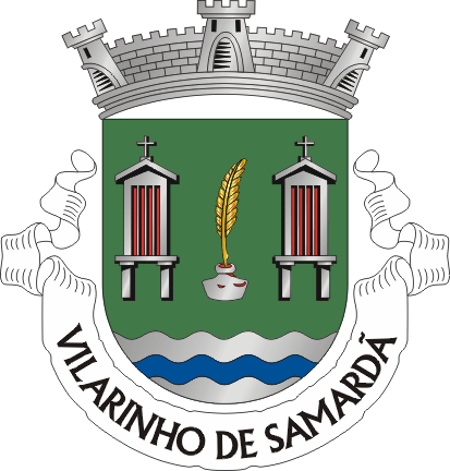 Brasão da freguesia de Vilarinho de Samardã (concelho de Vila Real)